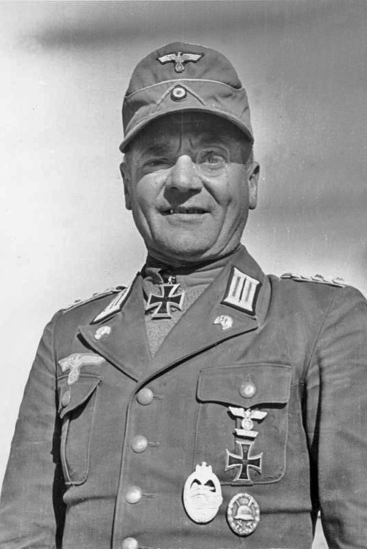 Oberst Cramer, Kommandeur Panzerregiment